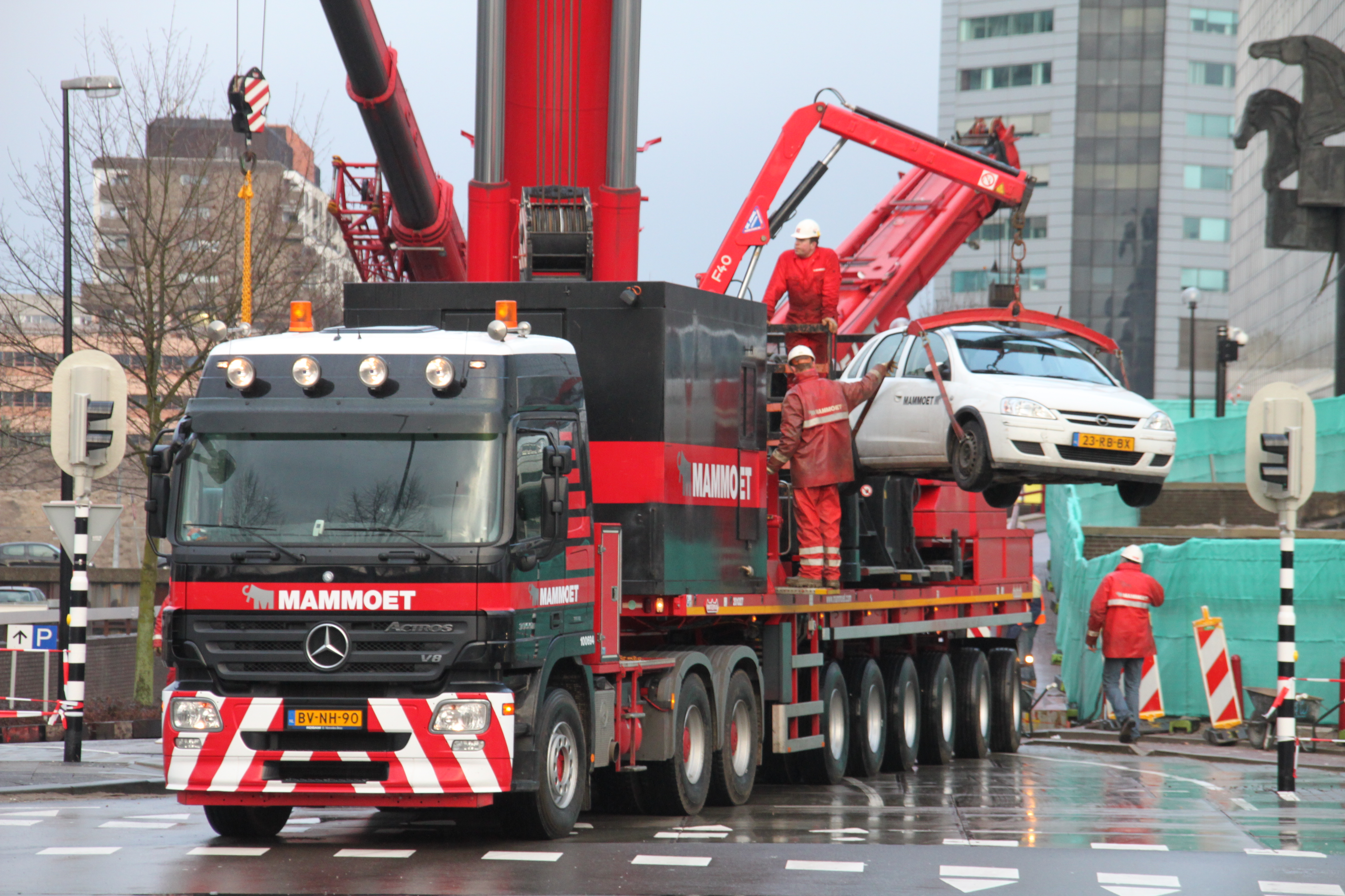 Mammoet in Utrecht